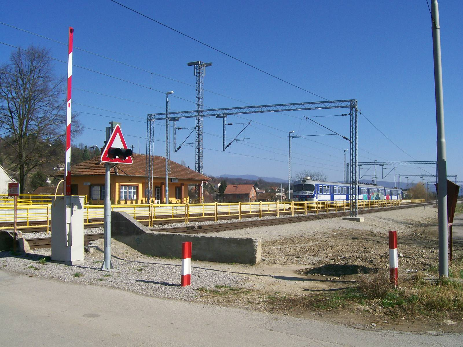 Željeznicka stanica Sutla (Šenkovec)